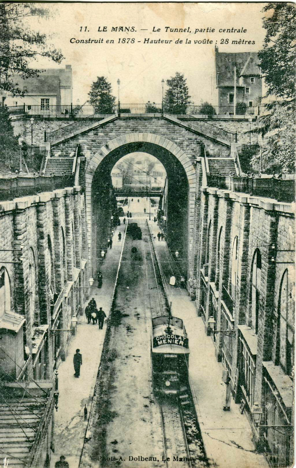 Carte postale ancienne éditée par Photo Dolbeau au Mans, n°11 Le Mans - Le Tunnel, partie centrale (Construit en 1878 - Hauteur de la voûte : 28 m) Vue d'une motrice de l'ancien tramway du Mans.